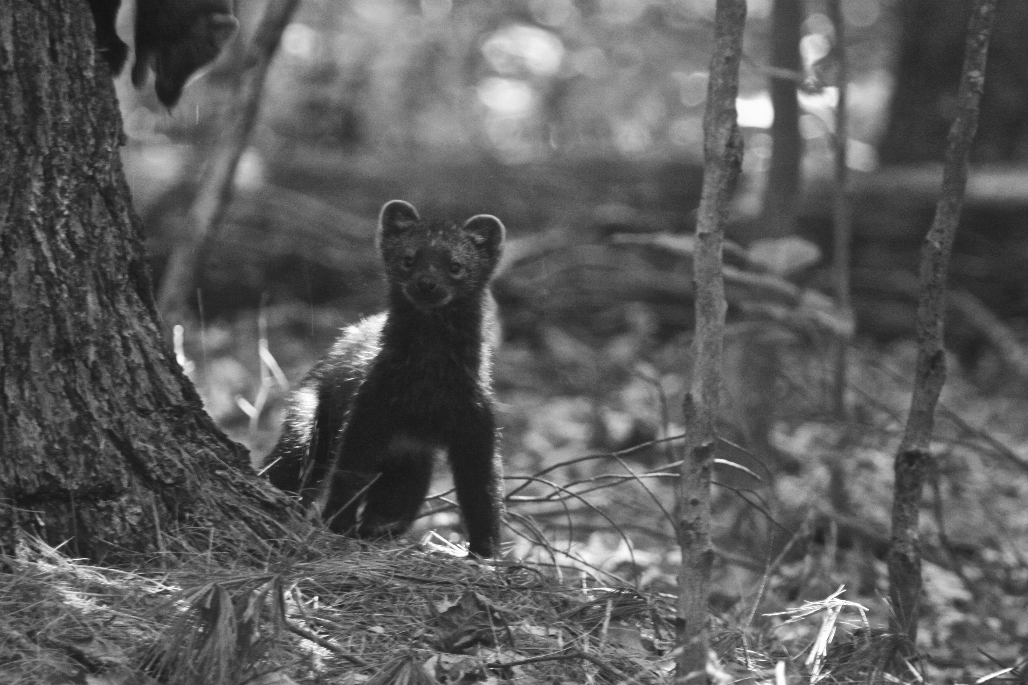 ipswich river audubon. ipswich, ma.